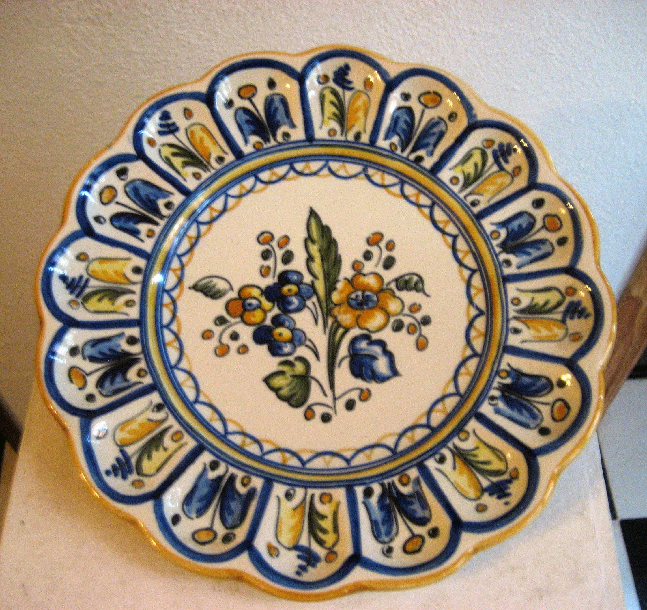 Plato con borde ondulado en policromía con ramillete central de cerámica de Talavera de la Reina Spain